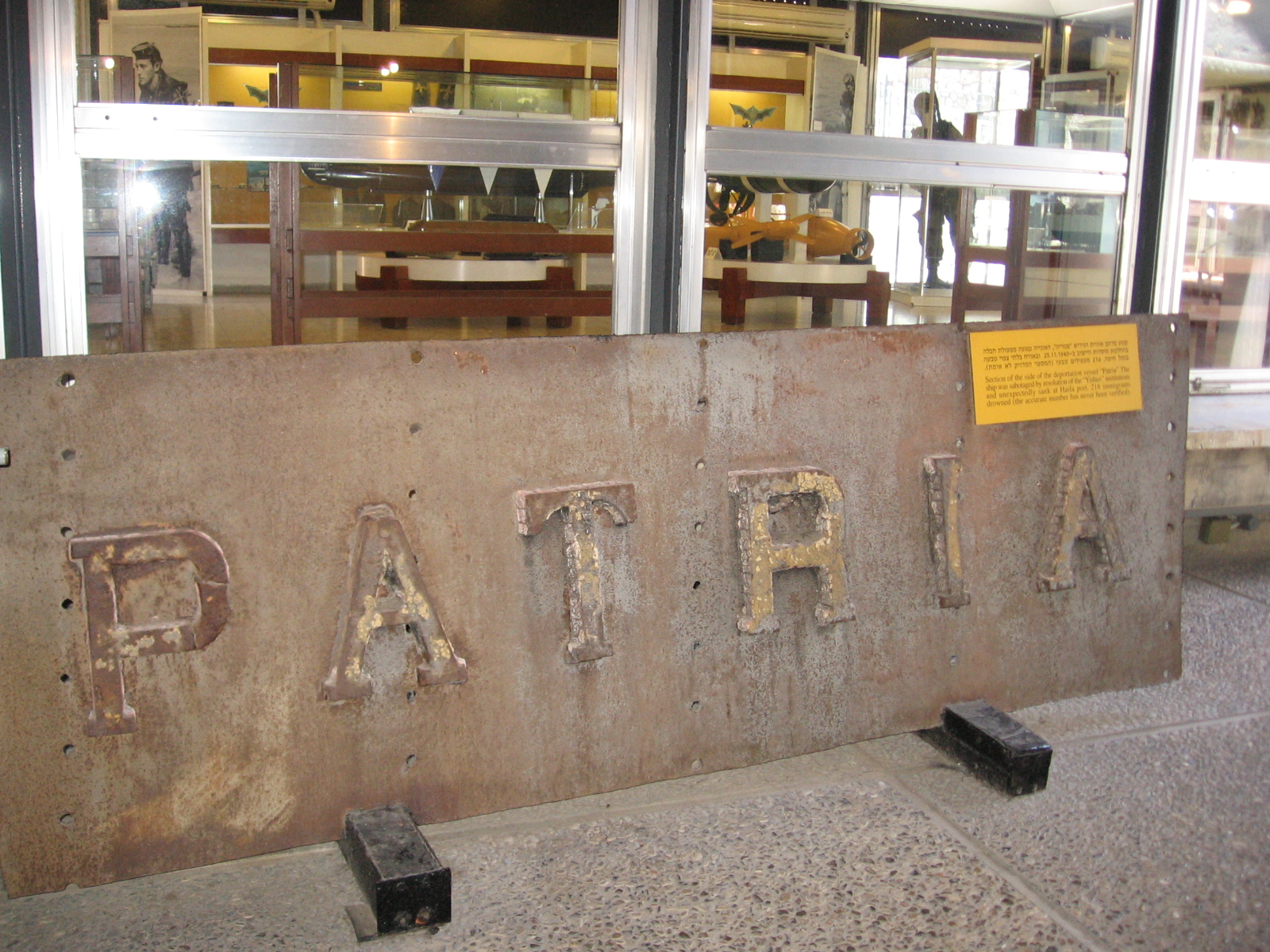 שרידי הפאטריה במוזיאון ההעפלה וחיל הים בחיפה